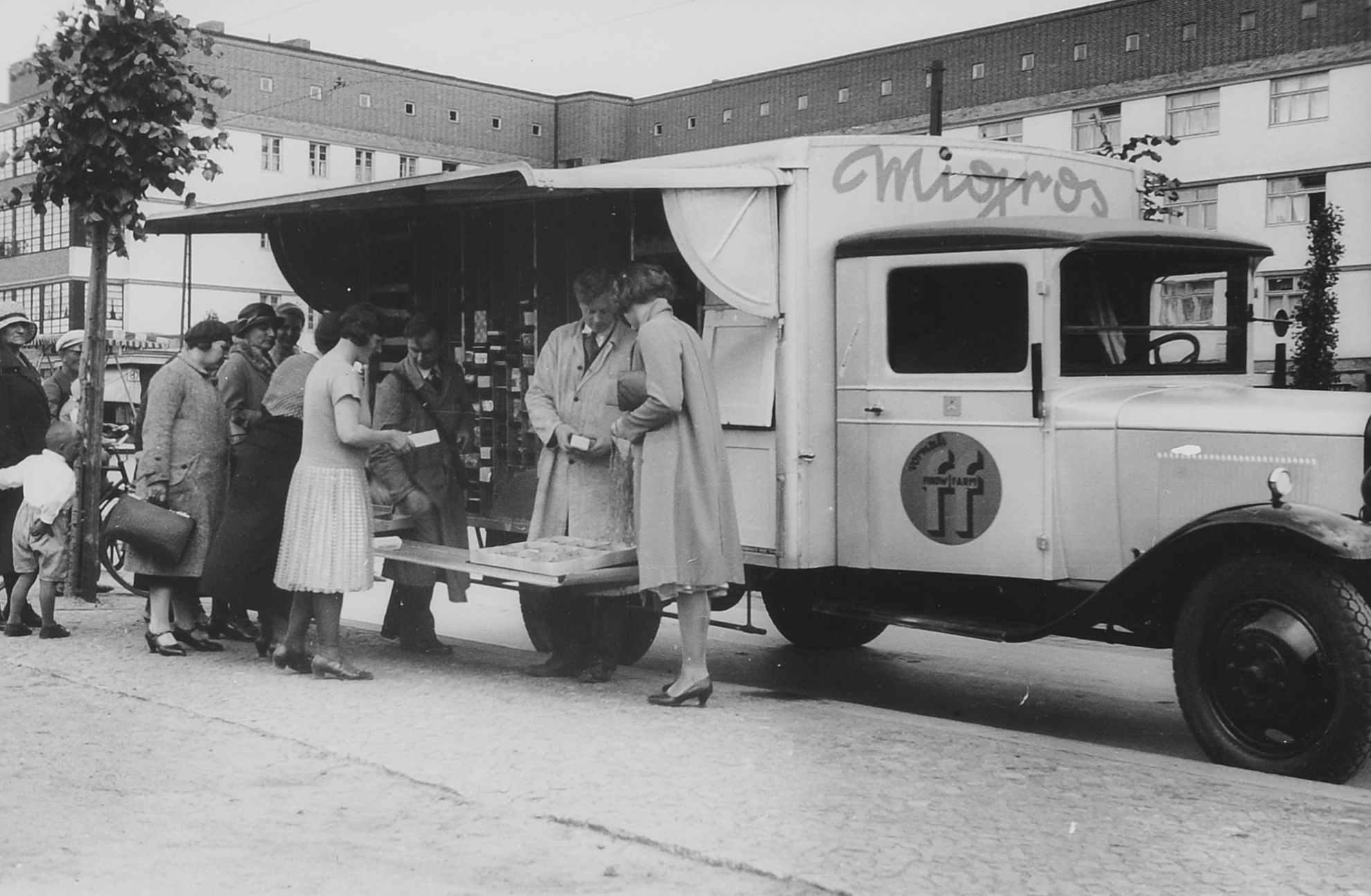 Migros Berlin - Verkaufssituation am Verkaufswagen